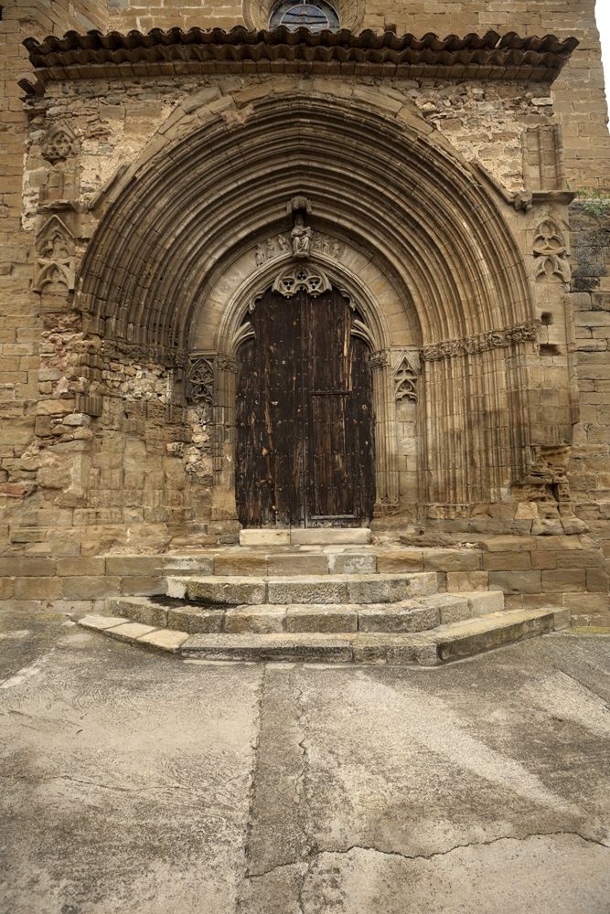 Cultural Heritage Spain